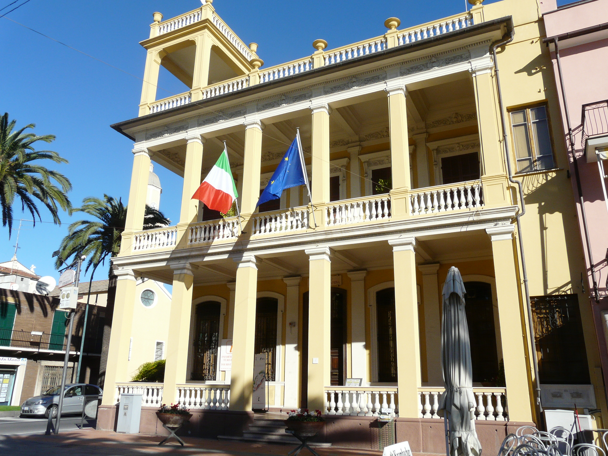 Palazzo "Elena Pietracaprina", Borghetto Santo Spirito, Liguria, Italia